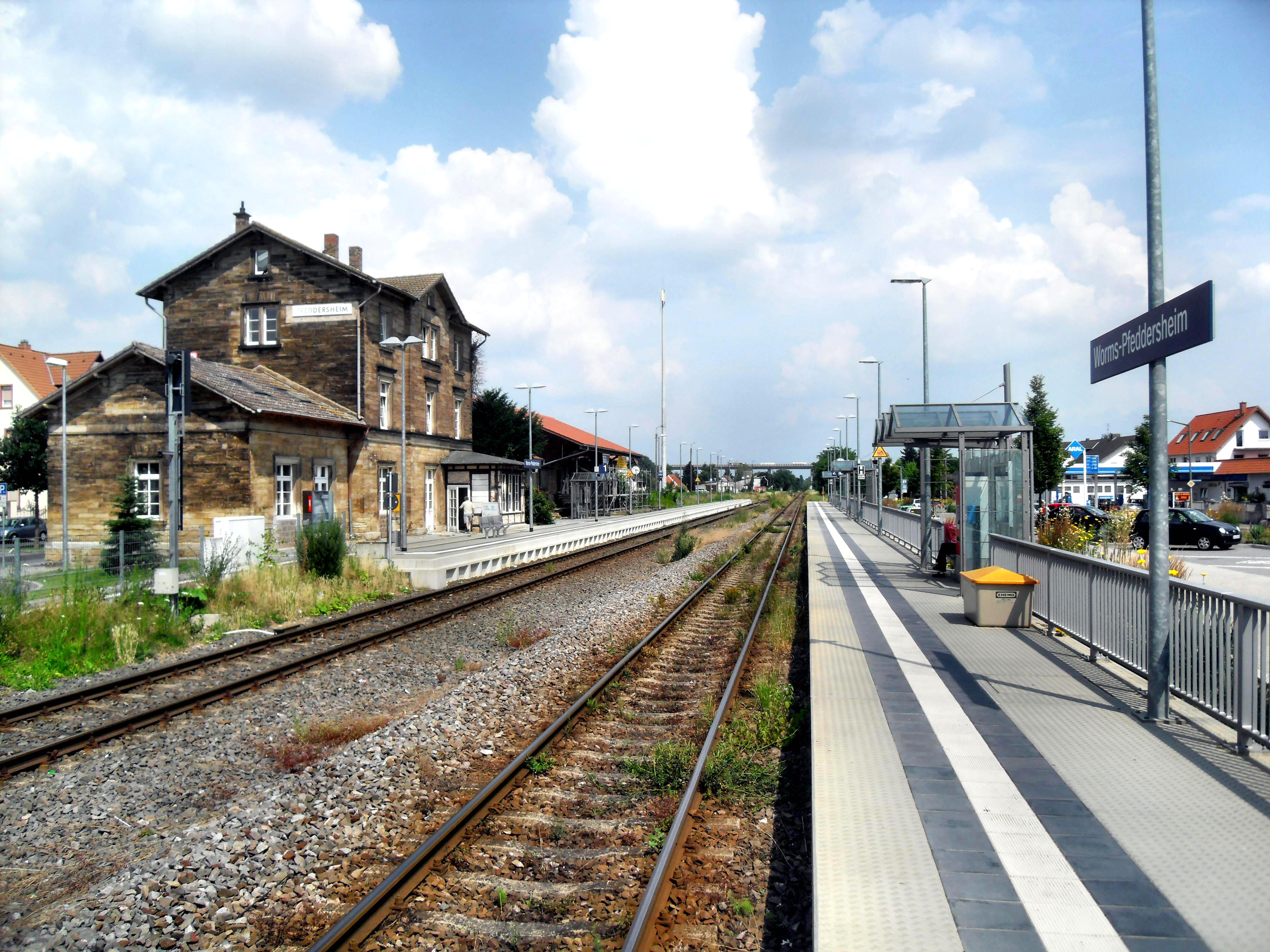 Die zwei Bahnsteige des Worms-Pfeddersheimer Bahnhofs mit seinem Empfangsgebäude in Rheinland-Pfalz (Deutschland)